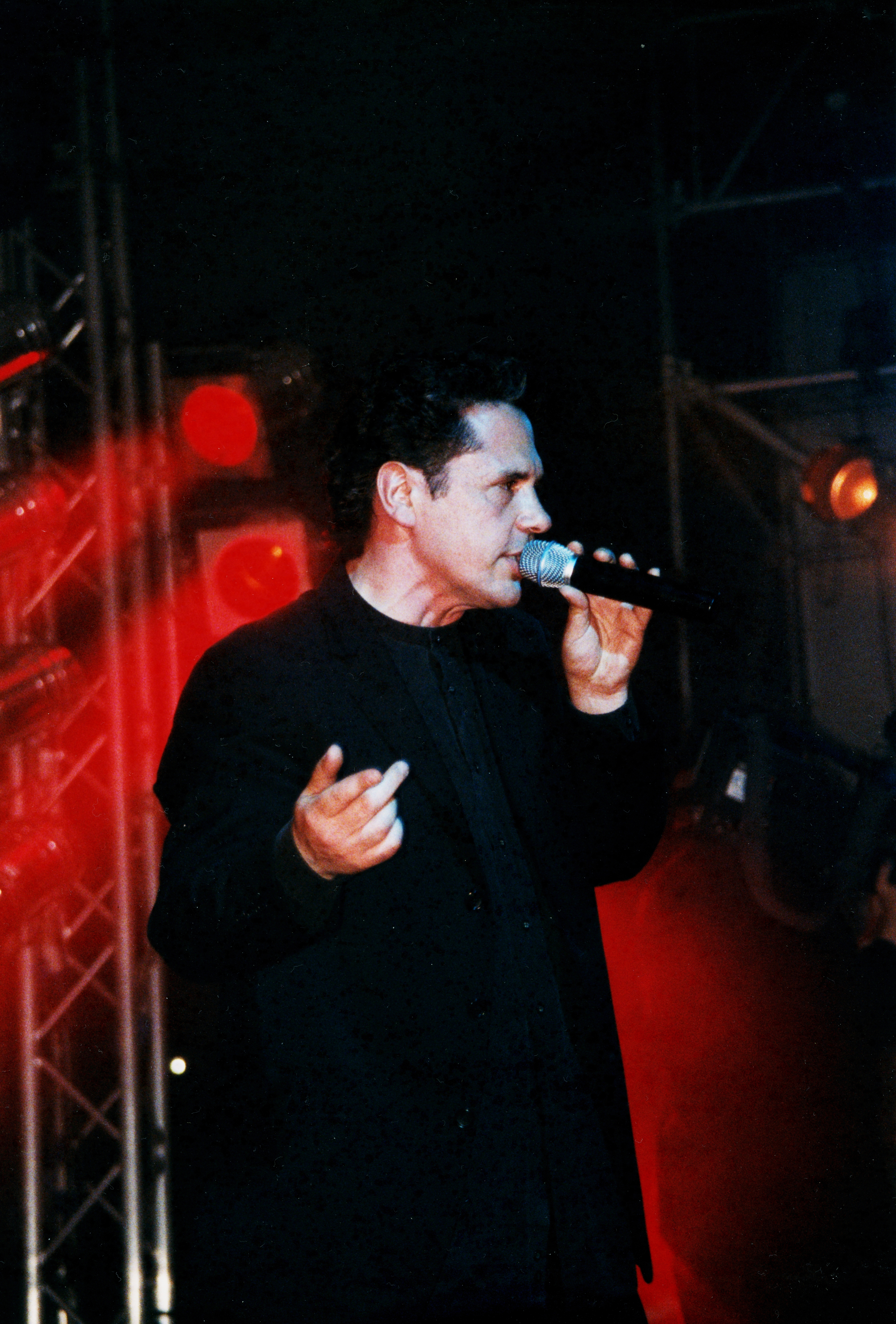 PADOVA - MAGGIO 2004